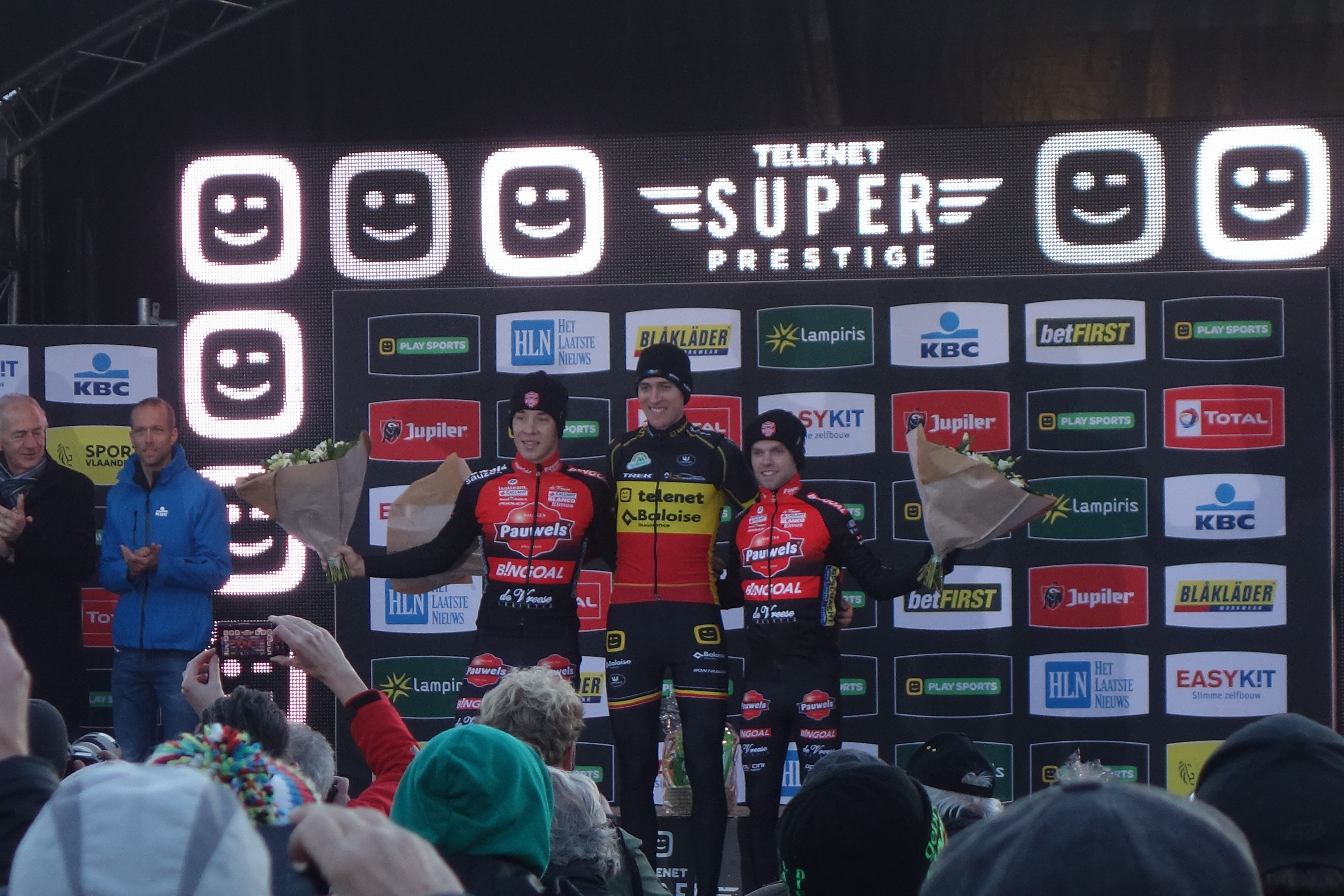 Superprestige veldrijden in de kuil van Zonhoven op zondag 8 december 2019